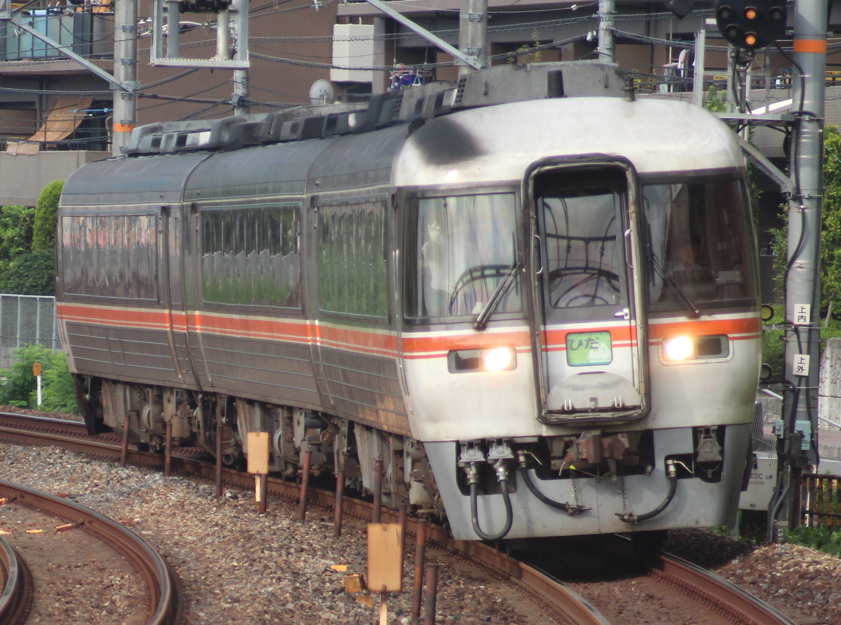 JR東海キハ85系気動車